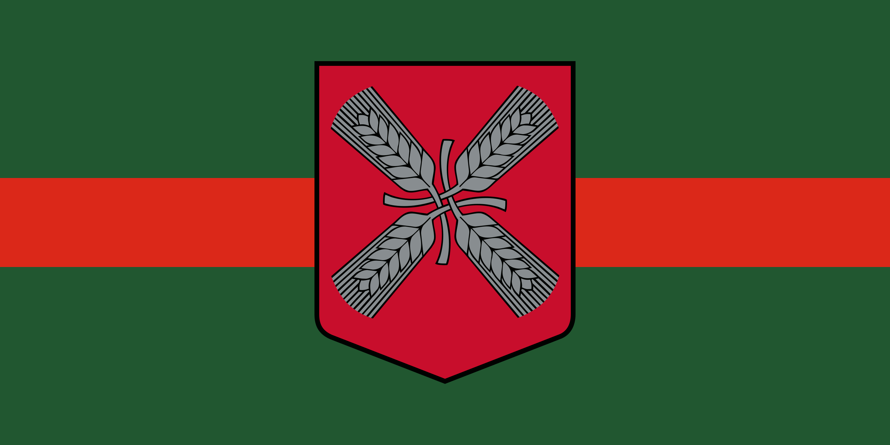 Valdgales pagasta karogs Valdgales pagasta karoga apraksts Valdgales pagasta karogs ir zaļš ar sarkanu horizontālu svītru un Valdgales pagasta ģerboni Zaļo un sarkanās svītras attiecība ir 2:1:2. Valdgales pagasta karoga platuma un garuma attiecība ir 1:2. Karoga krāsas ir: ģerbonim Pantone 341 C (zaļa), Pantone 877 C (sudraba) un Pantone Black C (melna), pamatnei Pantone 357C (zaļa), Pantone 485 C (sarkana).[1] Valdgales pagasta ģerboņa apraksts Sarkanā laukā četras sudraba šķērskrustā liktas miežu vārpas ar kātiem pinumā (Pielikums Nr.19). Ģerboņa krāsas ir: Pantone 186 C (sarkana), Pantone 877 C (sudraba) un Pantone Black C (melna).[1]